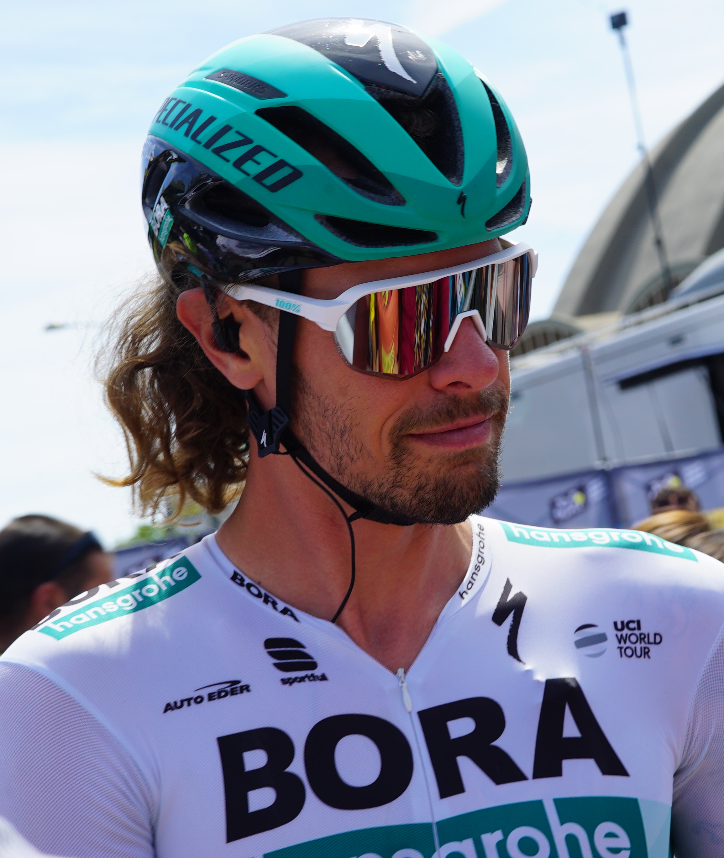 lors de la signature avant le départ de Reims.